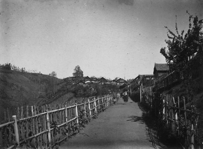 Foto. Het dorp Ngadasari met de weg naar de Zandzee, Oost-Java